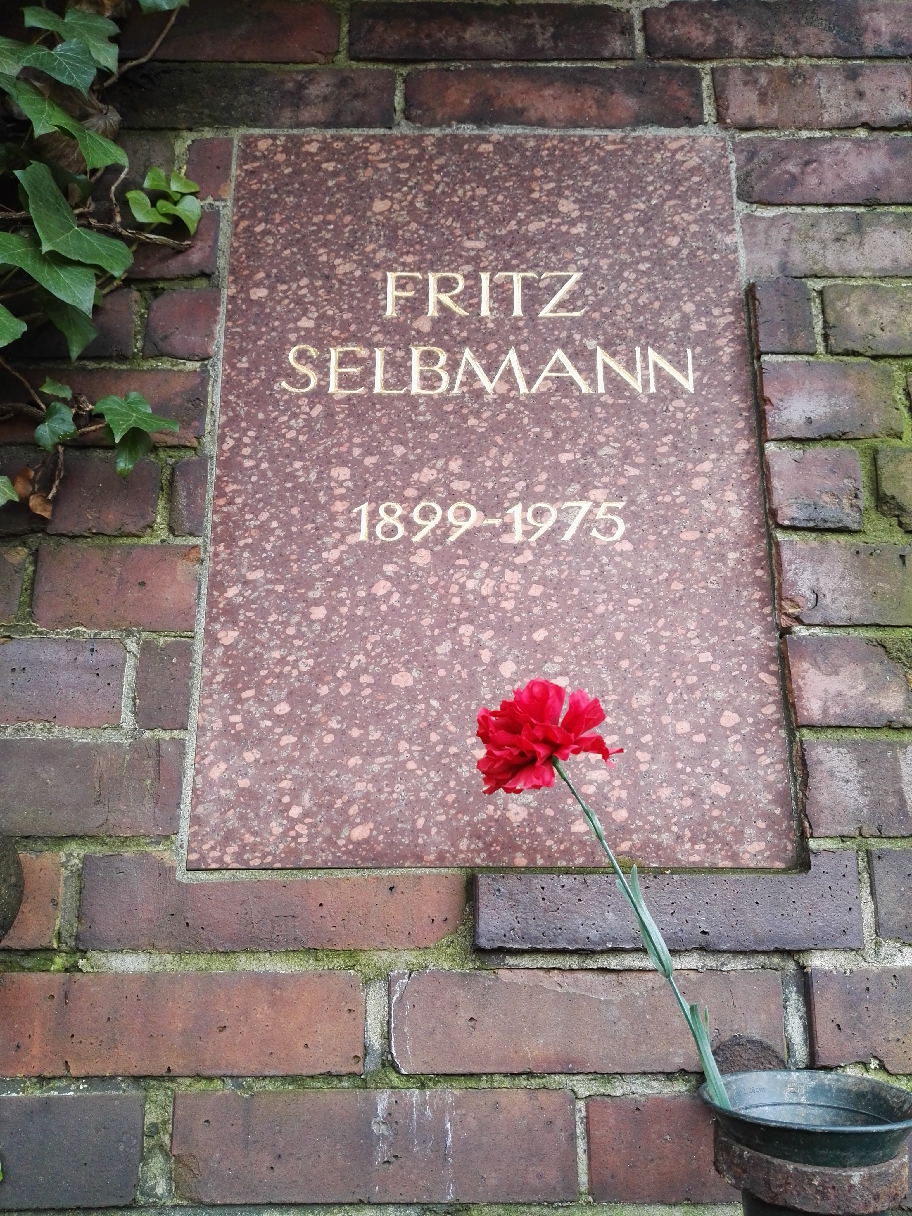 Grab von Fritz Selbmann in der Gedenkstätte der Sozialisten auf dem Zentralfriedhof Friedrichsfelde in Berlin-Lichtenberg